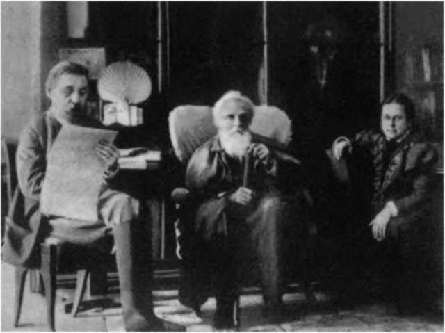 Бакунин Павел Александрович (в центре фотографии) в имении Горная Щель 1890